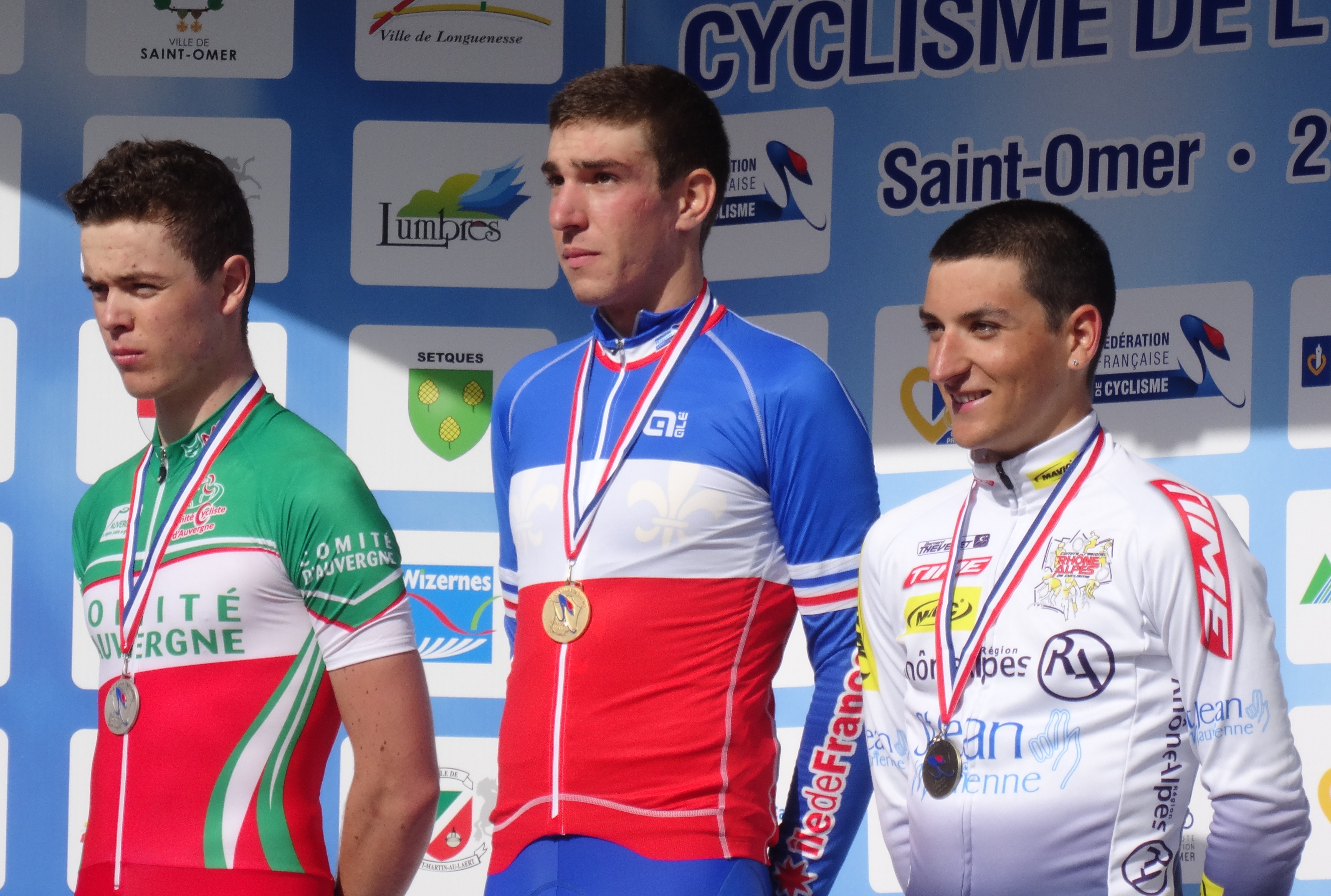 Reportage photographique réalisé le jeudi 21 août à l'occasion des Championnats de France de cyclisme sur route 2014 à Saint-Omer, Pas-de-Calais, Nord-Pas-de-Calais, France. La série A concerne le championnat de France du contre-la-montre juniors hommes, la série B le championnat de France du contre-la-montre espoirs hommes, la série C la remise des prix aux juniors hommes et la série D la remise des prix aux espoirs hommes. Depicted people: Rémi Cavagna, Bruno Armirail and Nans Peters